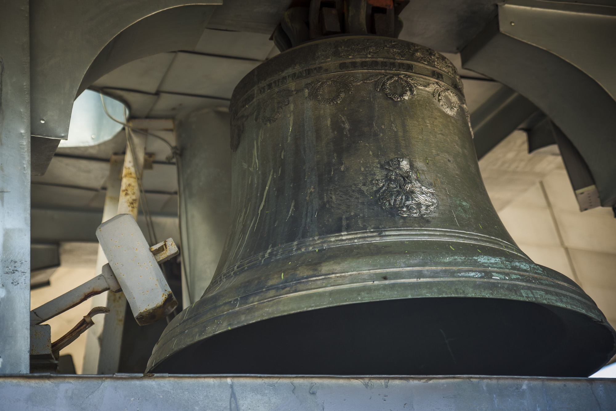 ратуша, Львів, Ринок пл., 1